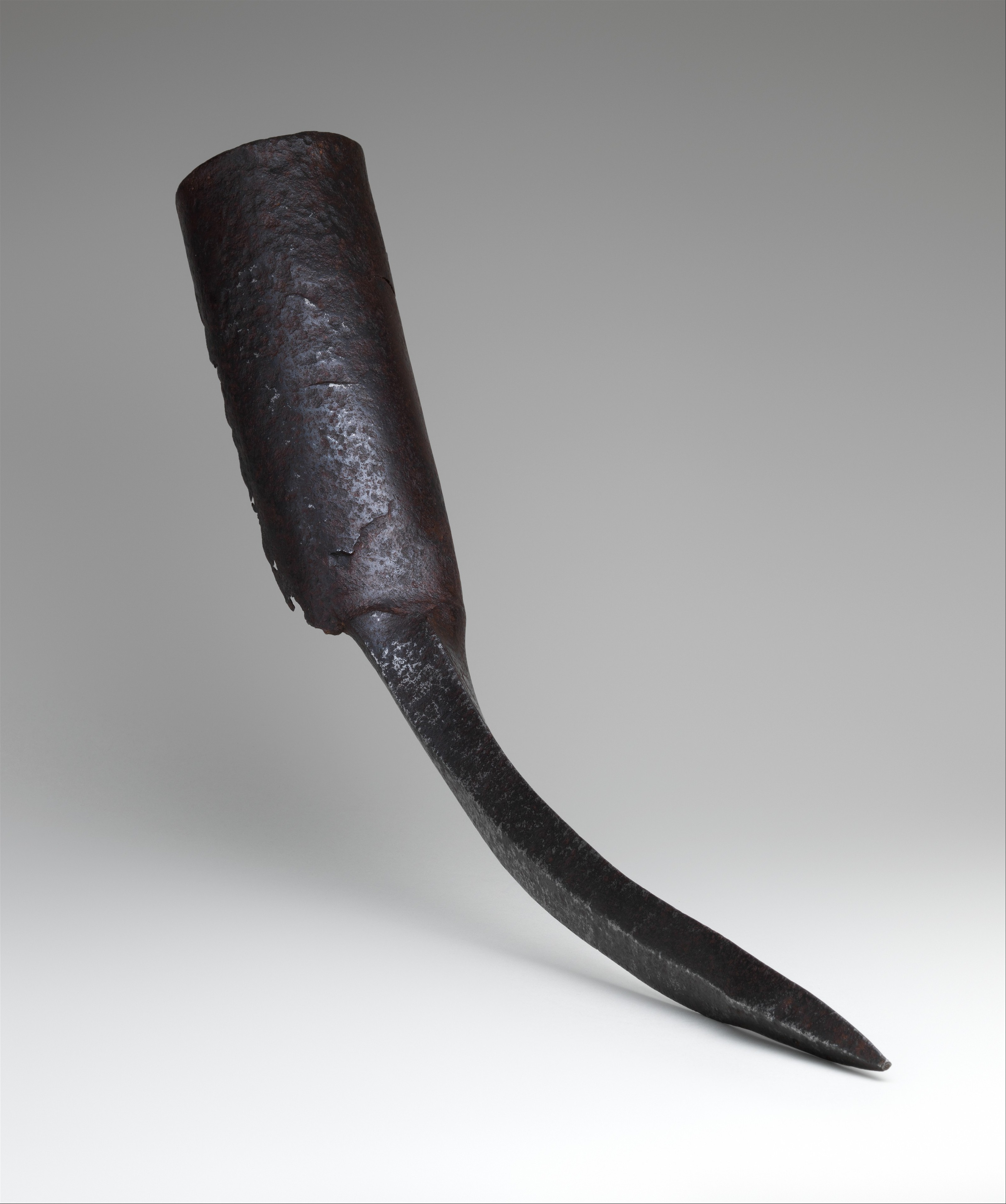 Indian; Elephant sword; Swords